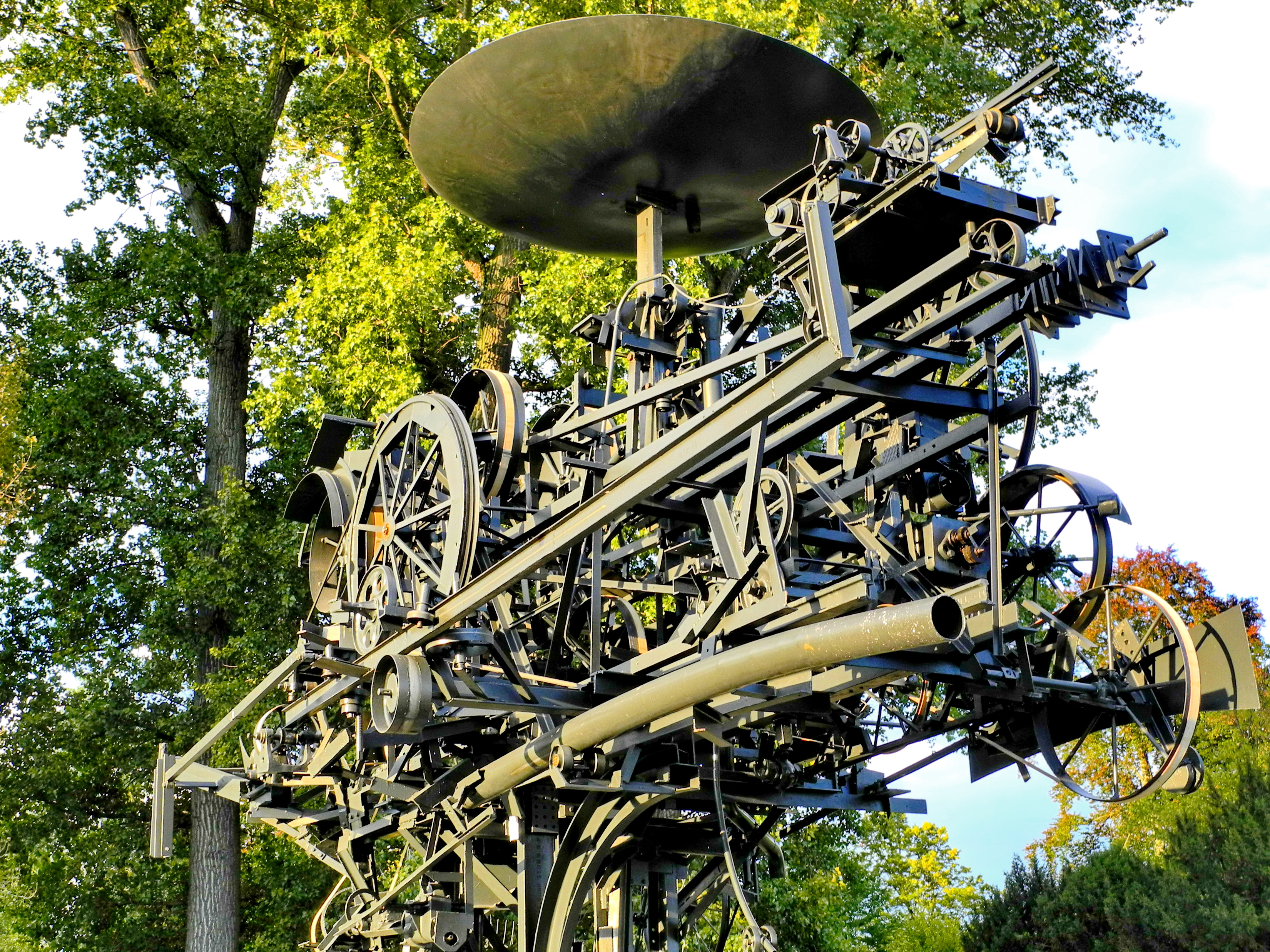 Zürichhorn